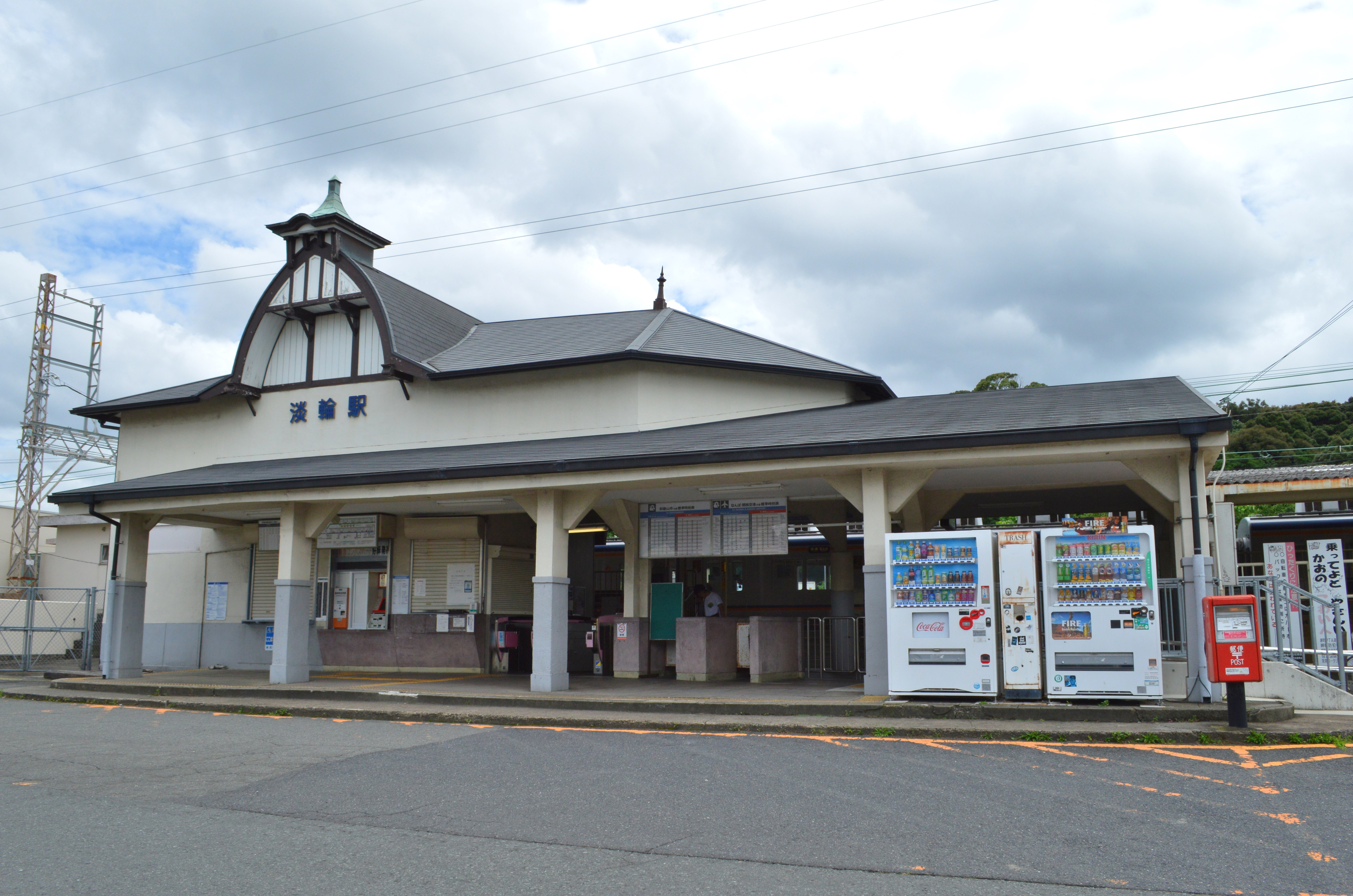 淡輪駅 駅舎